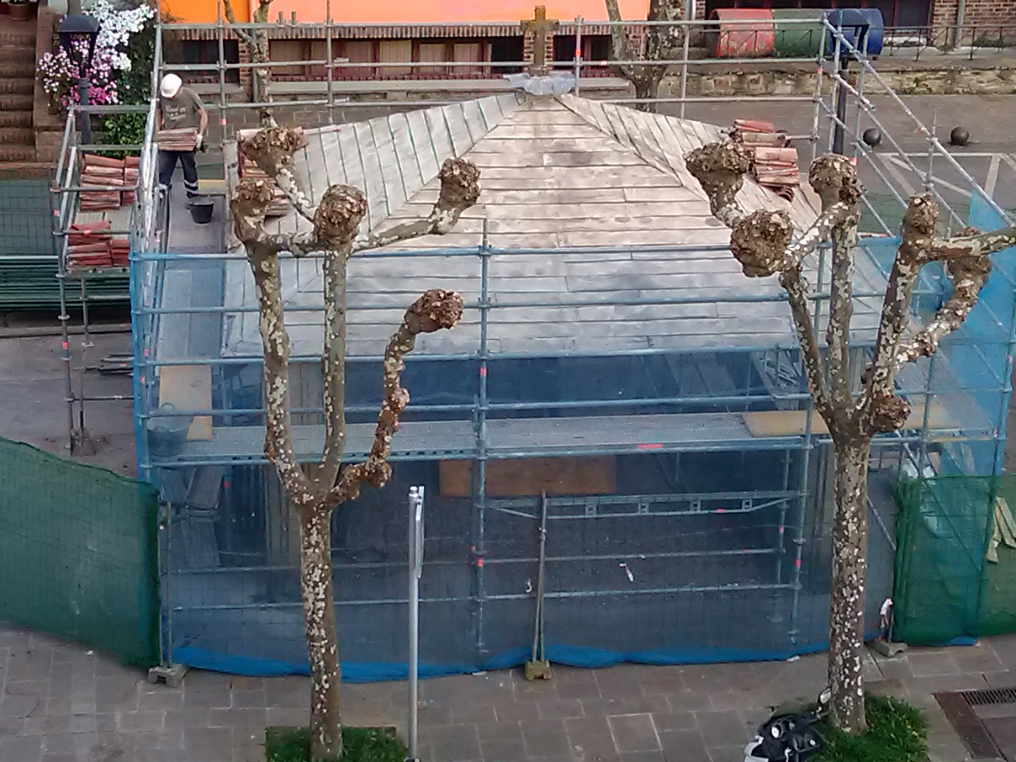 Humilladero de Kristo Portalekoa (Lekeitio). Trabajos de reparación en el techo, donde se pueden ver los listones del techo.